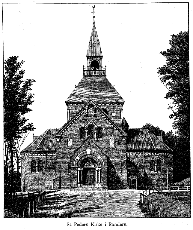 Sankt Peders Kirke i Randers, Danmark